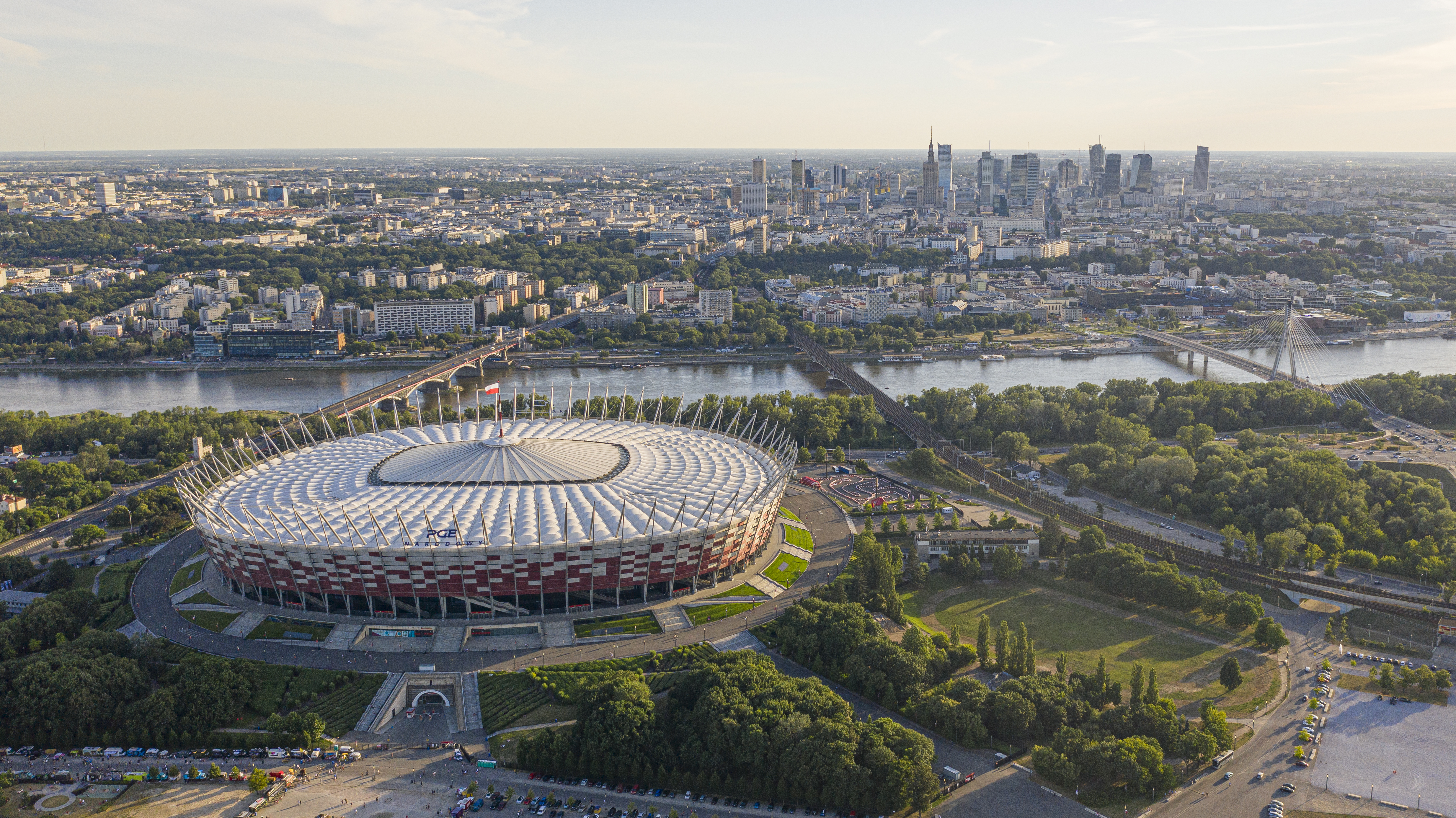 National Stadium Warsaw